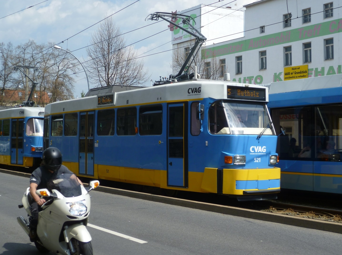 Modernisierte Tatra T3D in Chemnitz, 2013